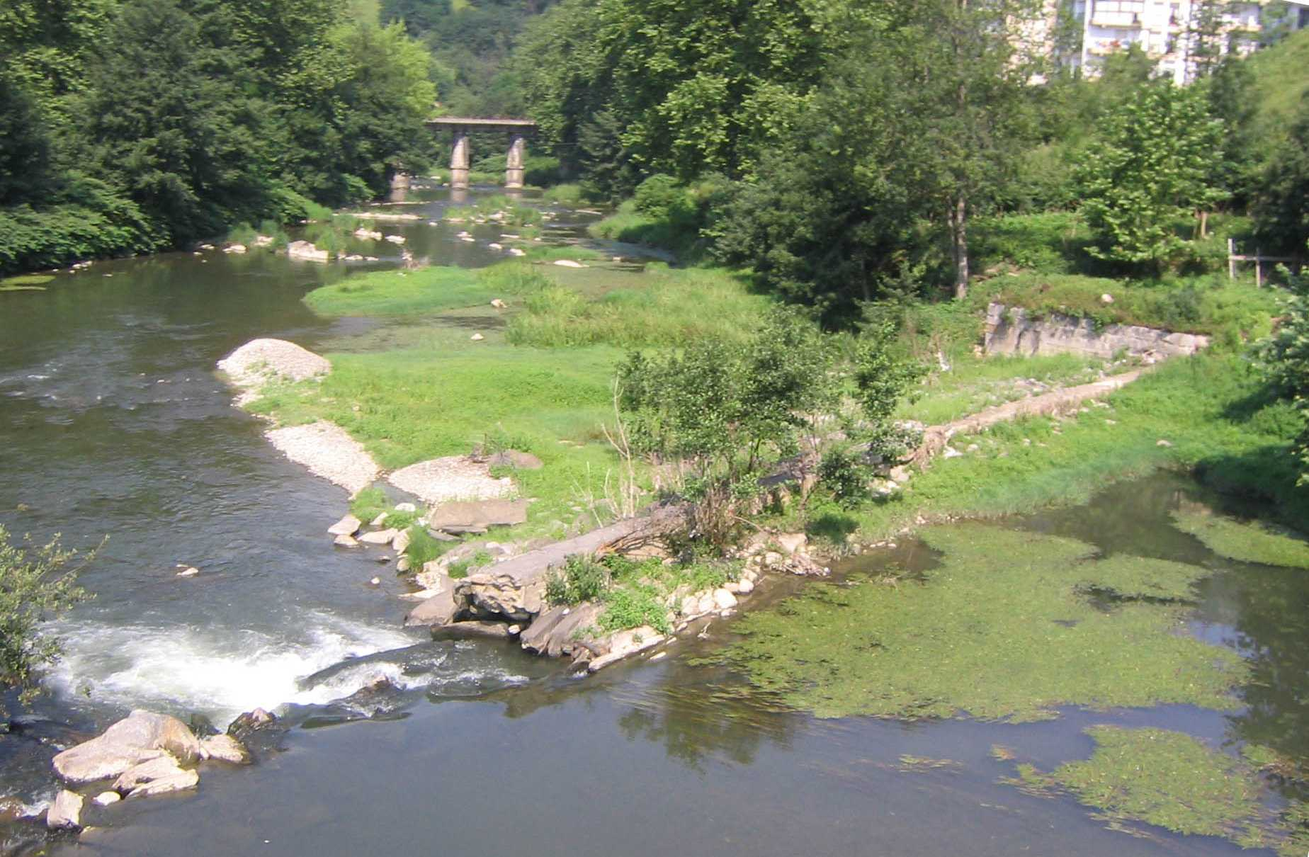 Río Urola a su paso por Cestona, Guipúzcoa, País Vaco, España.